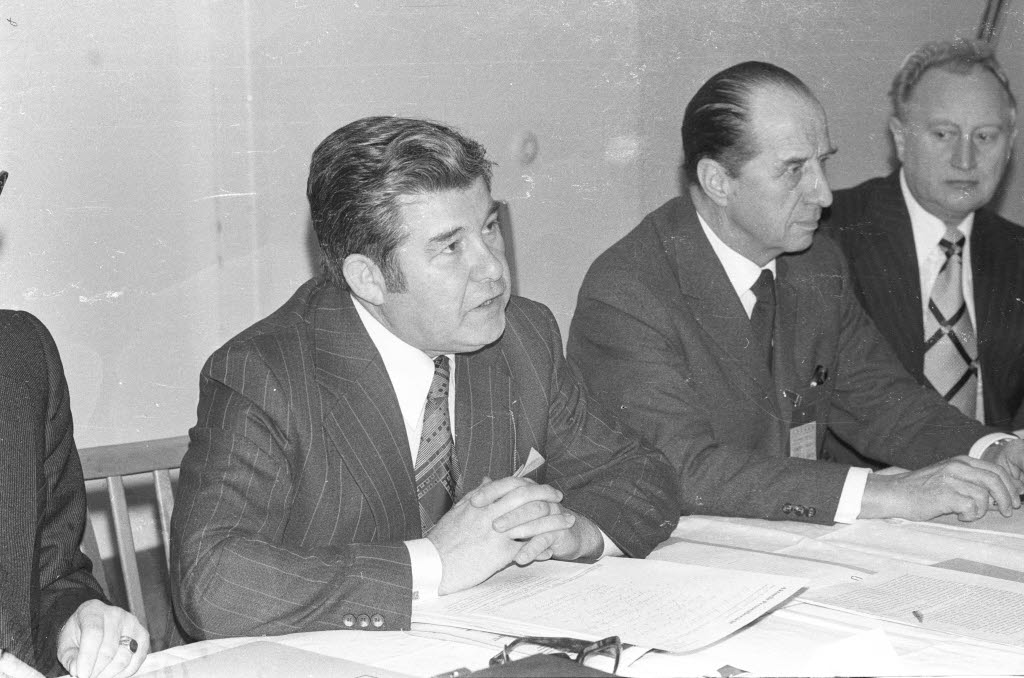 Fingerhut (1.v.l.) erklärt, dass die 1.336 Arbeitsplätze im Marinearsenal sicher seien und dass es nicht, wie vom Bundesrechnungshof gefordert, zu Entlassungen kommen werde. Am Tisch sitzt auch der Präsident des Bundeswehrbeschaffungsamtes in Koblenz Generalleutnant Dietrich Willikens (2.v.l.). Zudem sollen bis 1980/81 ca. 70 Millionen DM investiert werden.